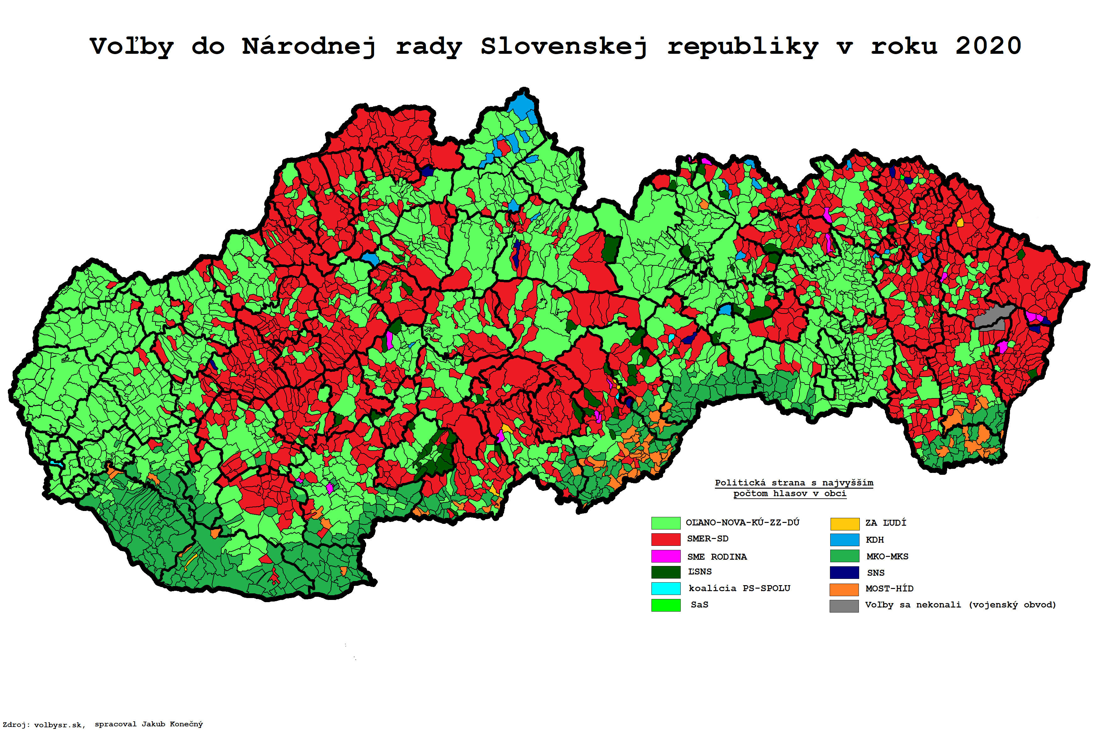 Výsledky volieb do Národnej rady Slovenskej republiky 29. februára 2020 na úrovni obcí - obce sú vyfarbené vo farbe strany, ktorá v nich získala najviac hlasov.